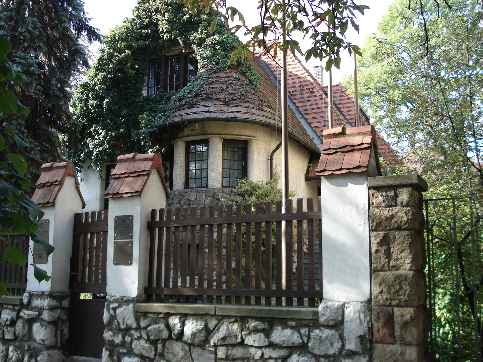 Szecessziós villa, 1928. Tervezte: Kós Károly - Miskolc, Görgei Artúr utca 32 This is a photo of a monument in Hungary. Identifier: 2943